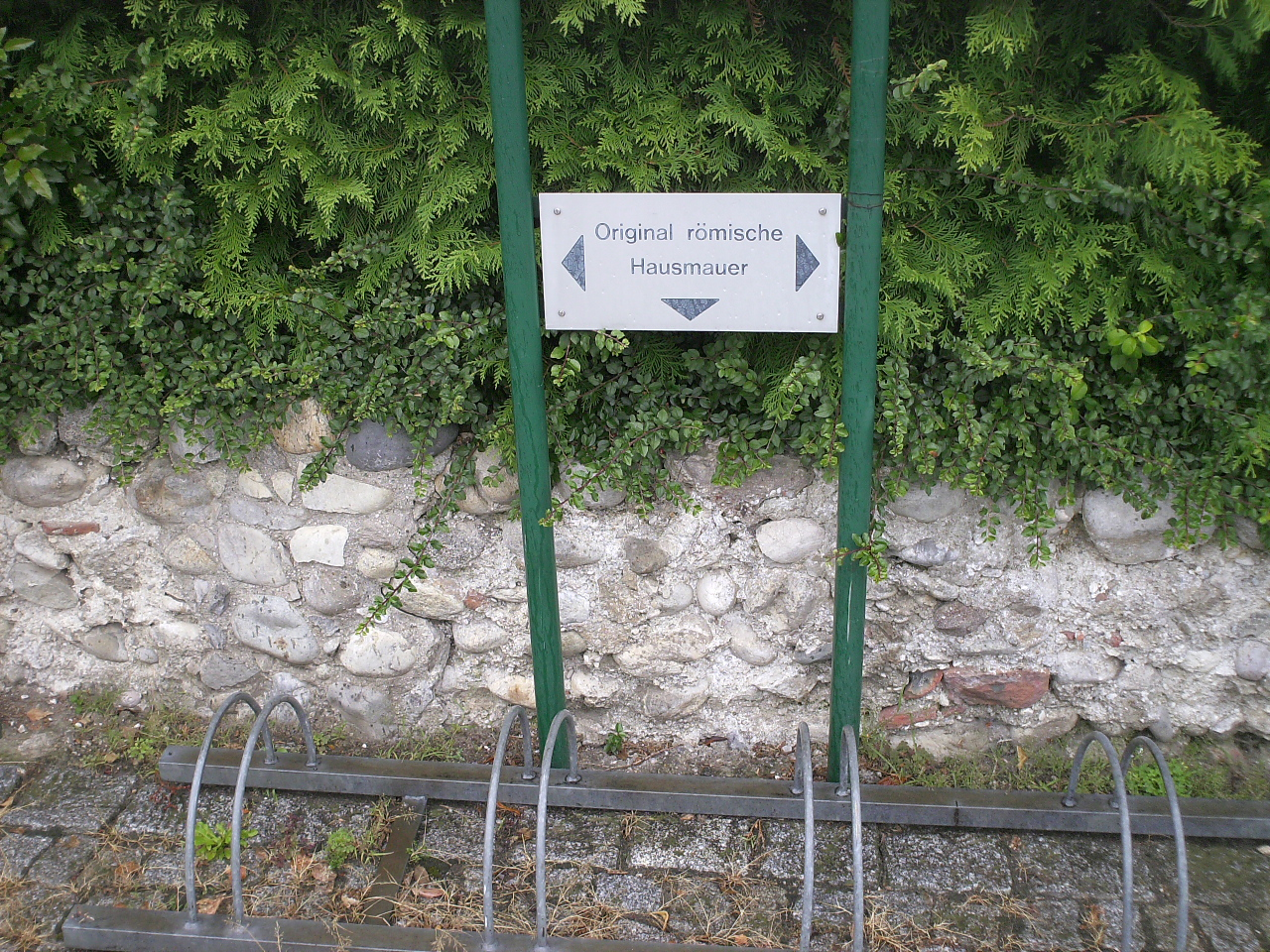 Mauerrest eines antiken Hauses der Zivilstadt bei der St Laurenz Basilika